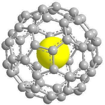 fig 4